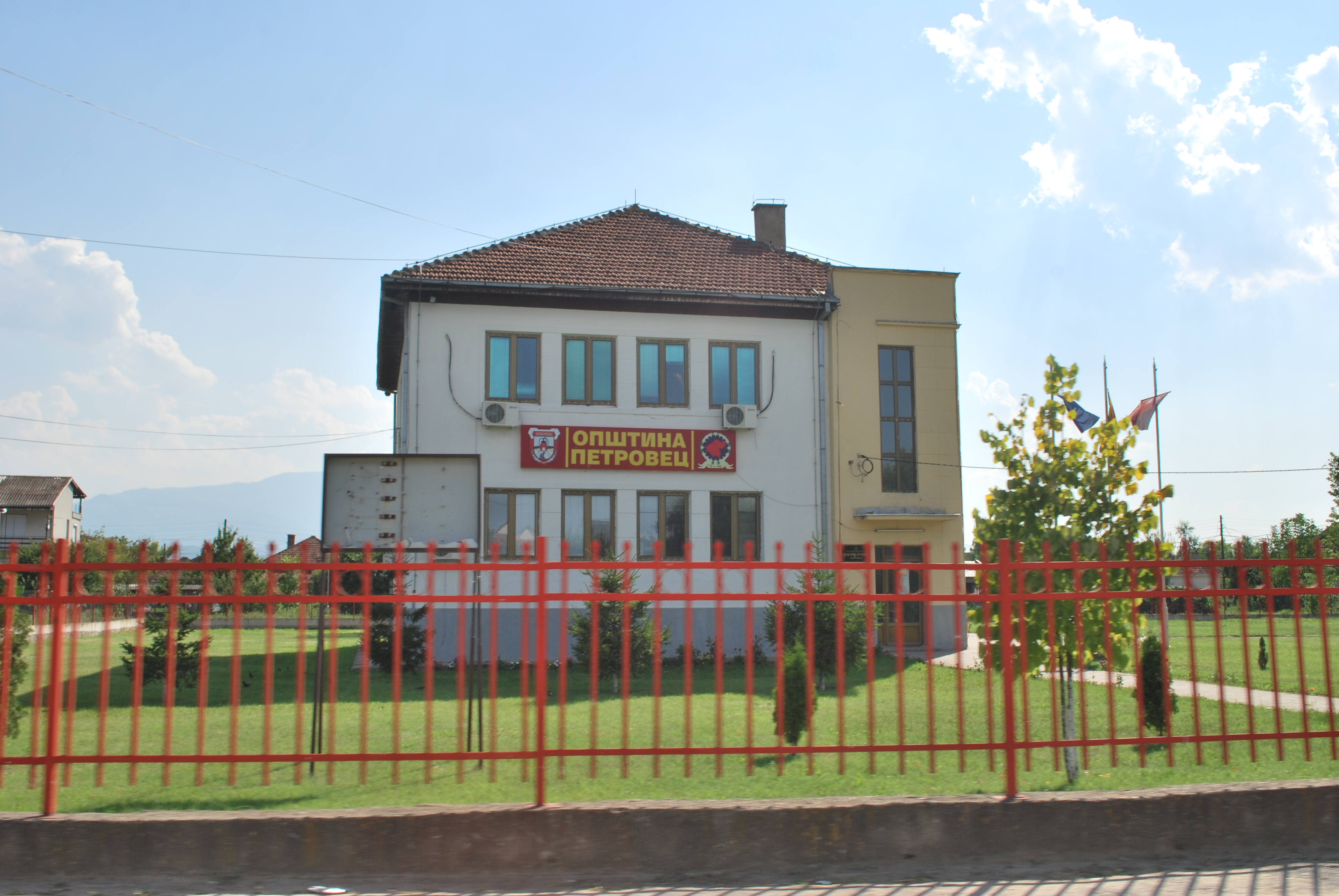 Административната зграда на општина Петровец во Петровец